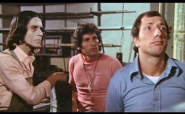 Screenshot dal film Furto di sera bel colpo si spera (1974)